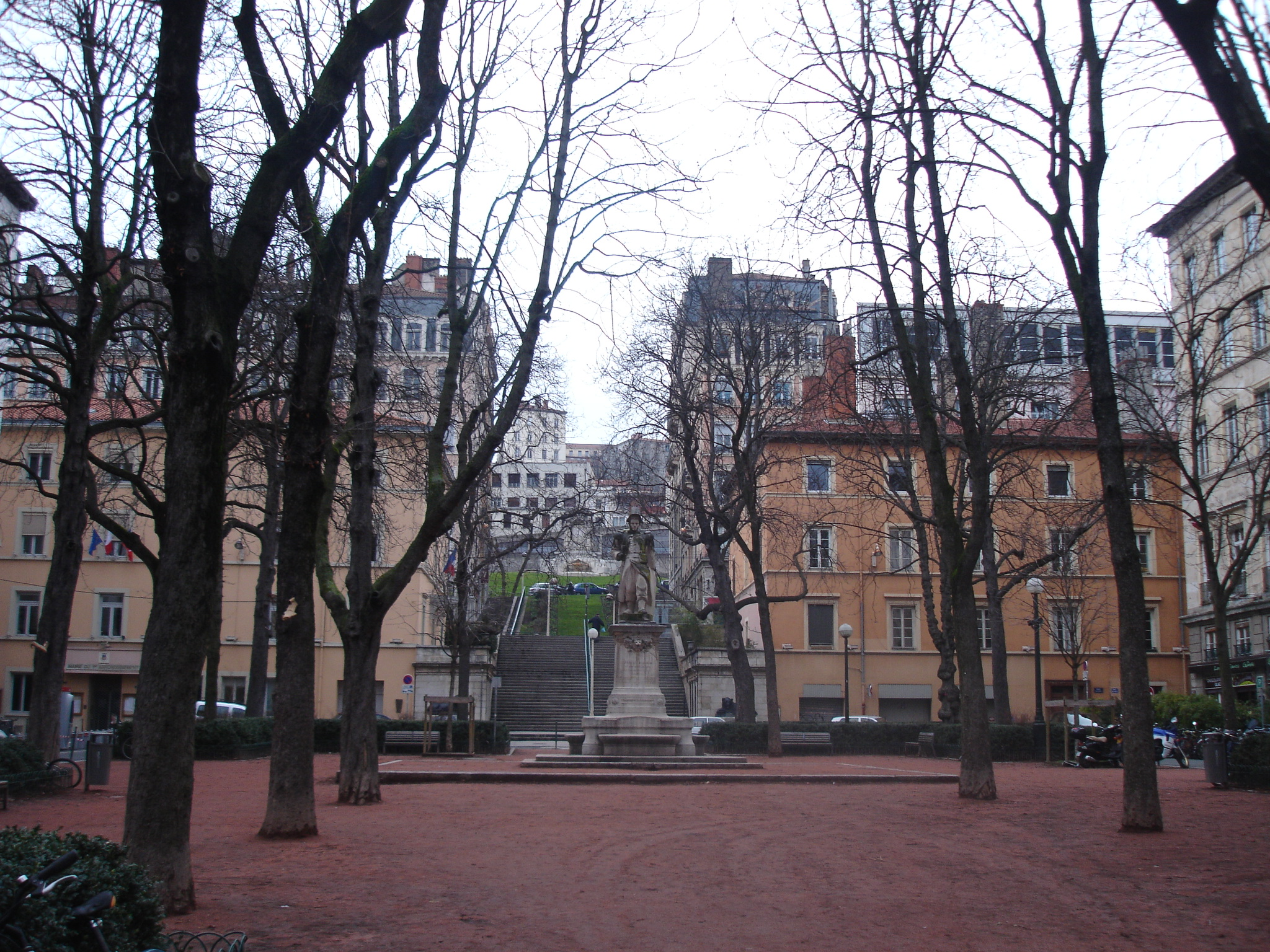 Lyon place Sathonay, vue générale